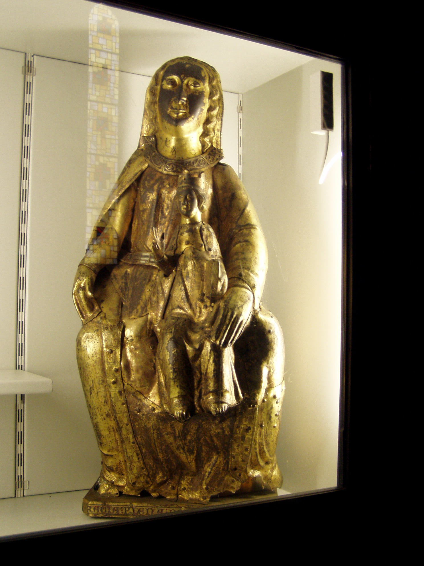 Vierge à l'enfant du 13ème siècle de l'église de Soubrebost dans le département de la Creuse